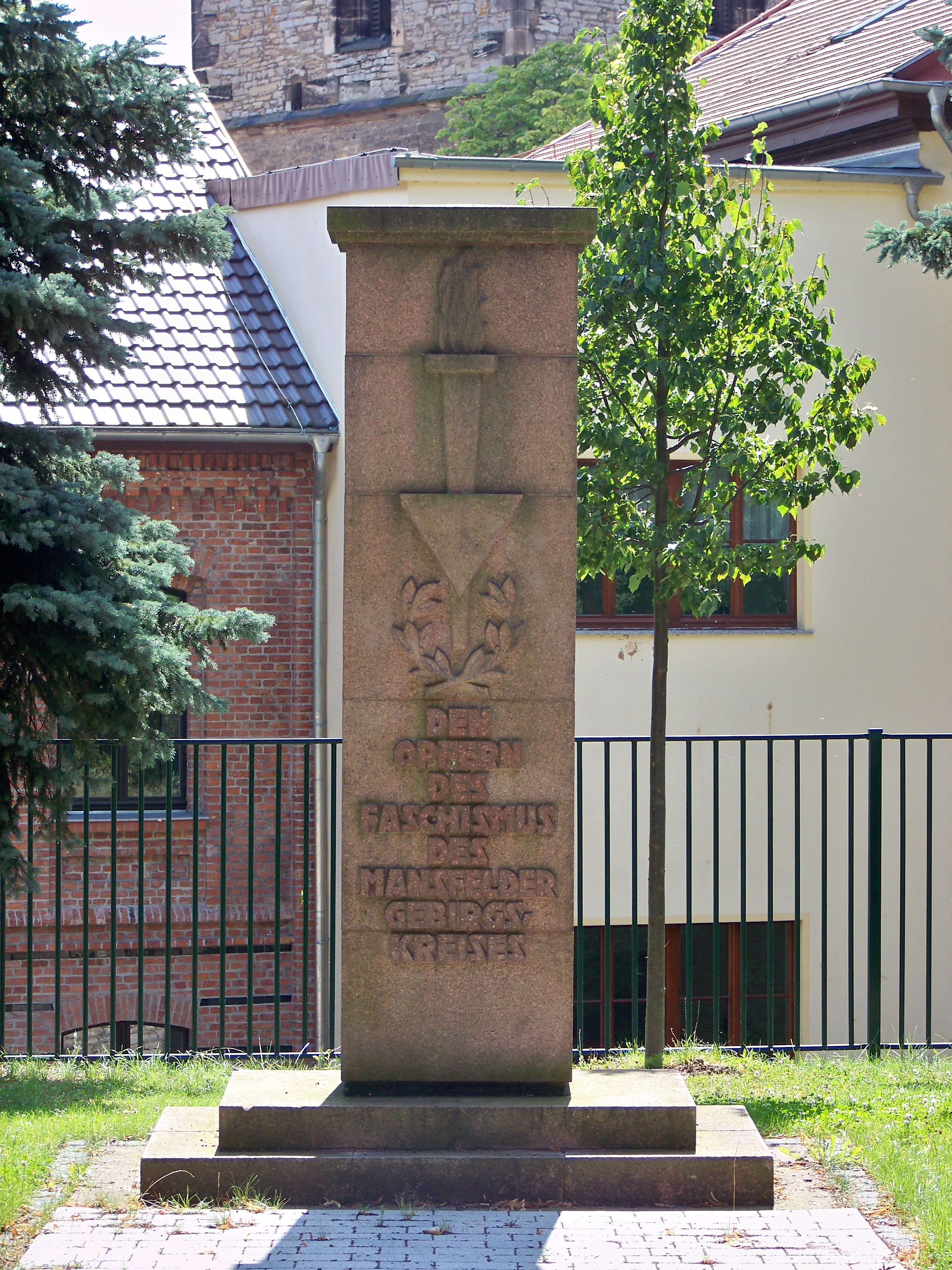 Opfer des Faschismus-Denkmal in Hettstedt